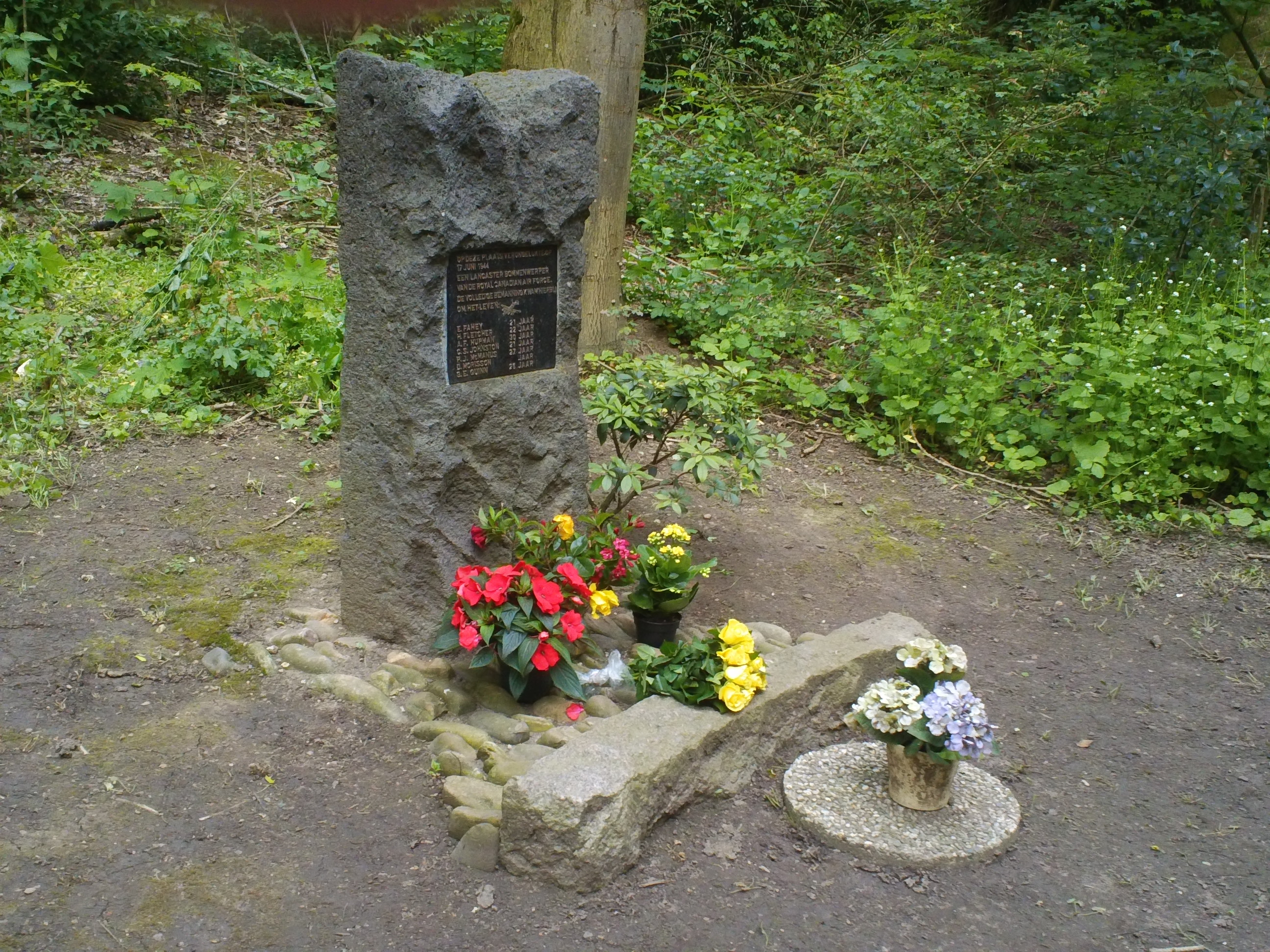 Het 'Monument voor Britse Vliegers' in Arnhem-Zuid is een stenen gedenkzuil met een zwart gedenkplaatje. Het staat aan de Delftweg. De tekst op het gedenkplaatje luidt: 'OP DEZE PLAATS VERONGELUKTE OP 17 JUNI 1944 EEN LANCASTER BOMMENWERPER VAN DE ROYAL CANADIAN AIR FORCE. DE VOLLEDIGE BEMANNING KWAM HIERBIJ OM HET LEVEN: E. FAHEY 21 JAAR, H. FLETCHER 22 JAAR, A.F. HUPMAN 30 JAAR, C.S. JOHNSTON 21 JAAR, P.J. McMANUS 27 JAAR, D. MORRISON JAAR, G.E. QUINN 26 JAAR'. Meer hierover: Sta een ogenblik stil... Monumentenboek 1940/1945 van Wim Ramaker en Ben van Bohemen. (Kampen, Uitgeversmaatschappij J.H. Kok Matrijs, 1980). ISBN 90 242 0185 3.